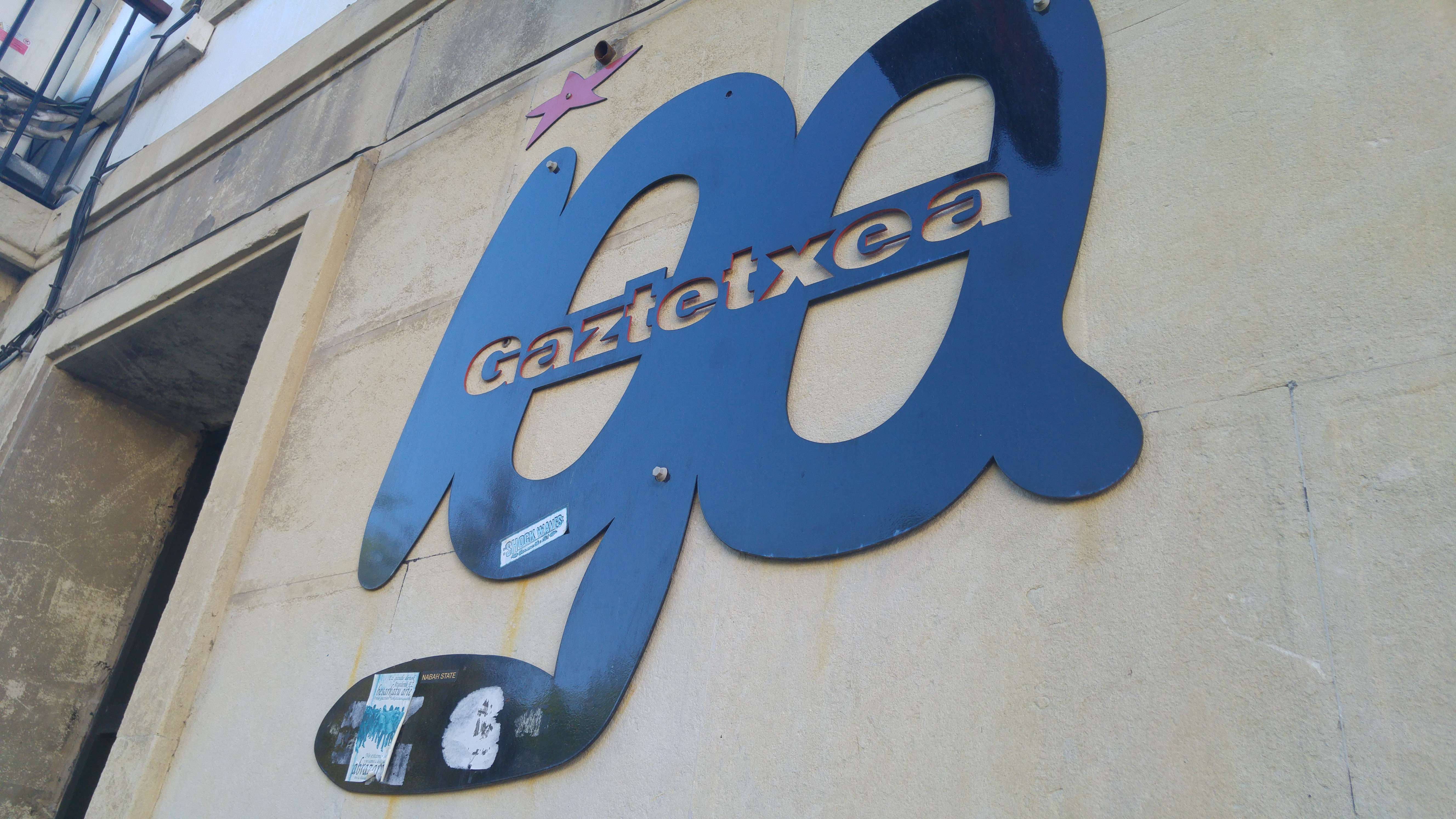 Idiazabalgo gaztetxea.